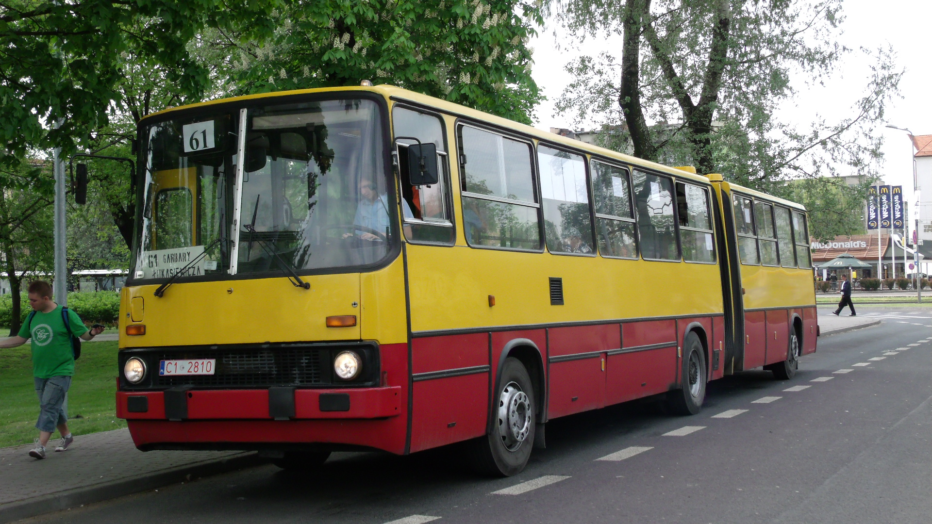 Ikarus 280.70E